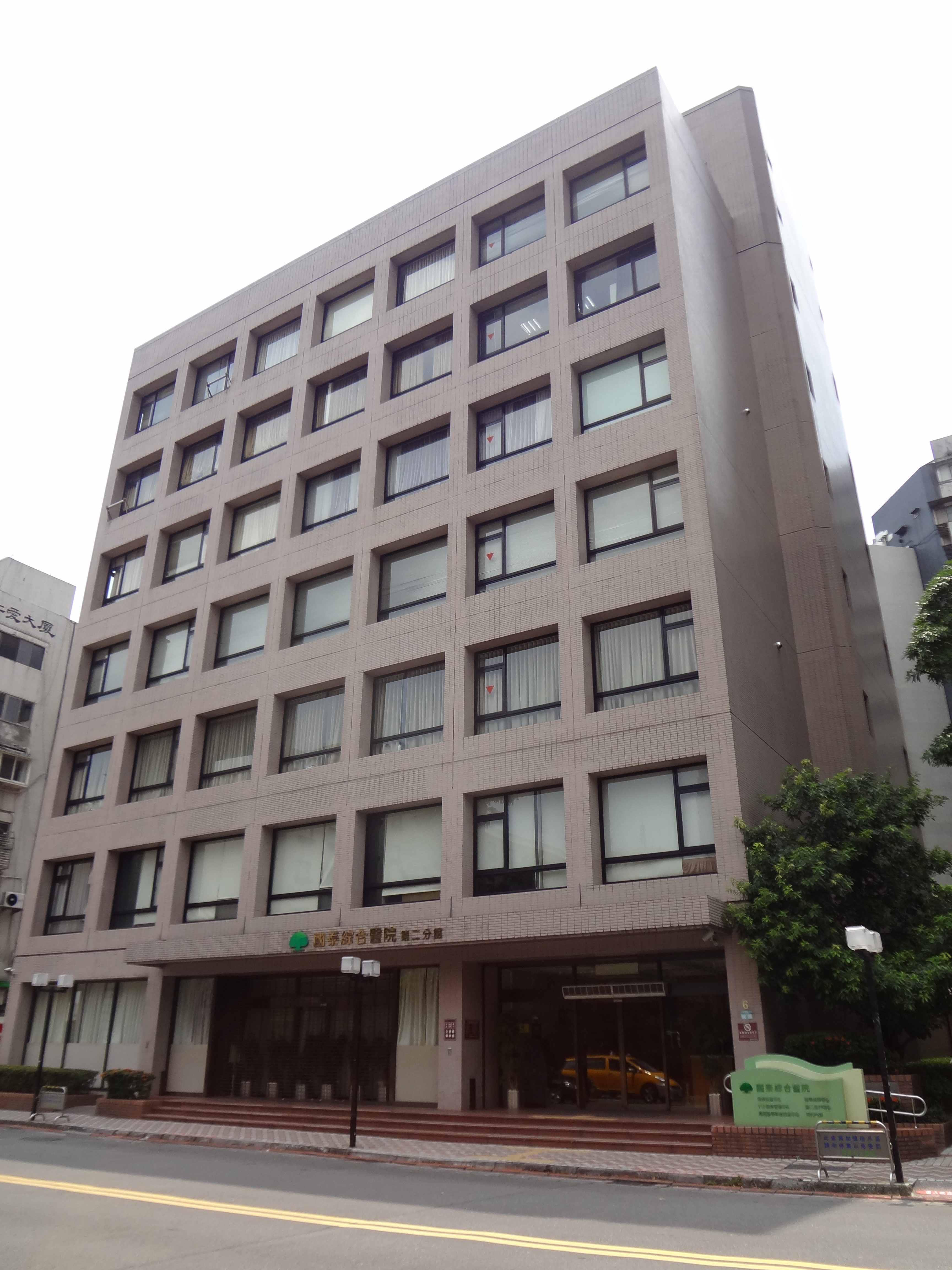 國泰綜合醫院總院第二分館，位於臺北市大安區仁愛路四段266巷6號。